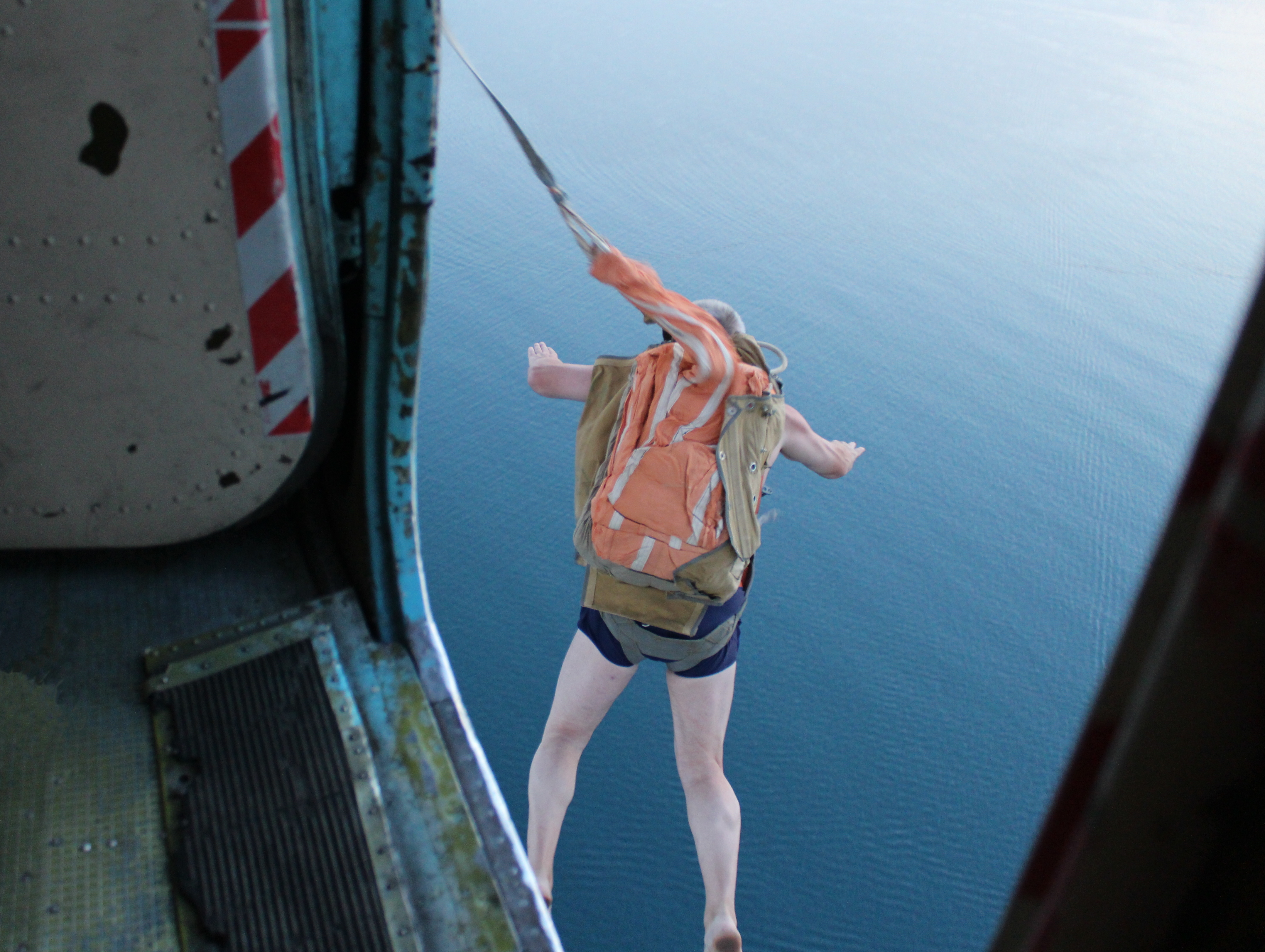 Володимир Борисович Петровський здійснює свій третій стрибок з парашутом (24 серпня 2013 року, Коктебель, АР Крим, Україна)